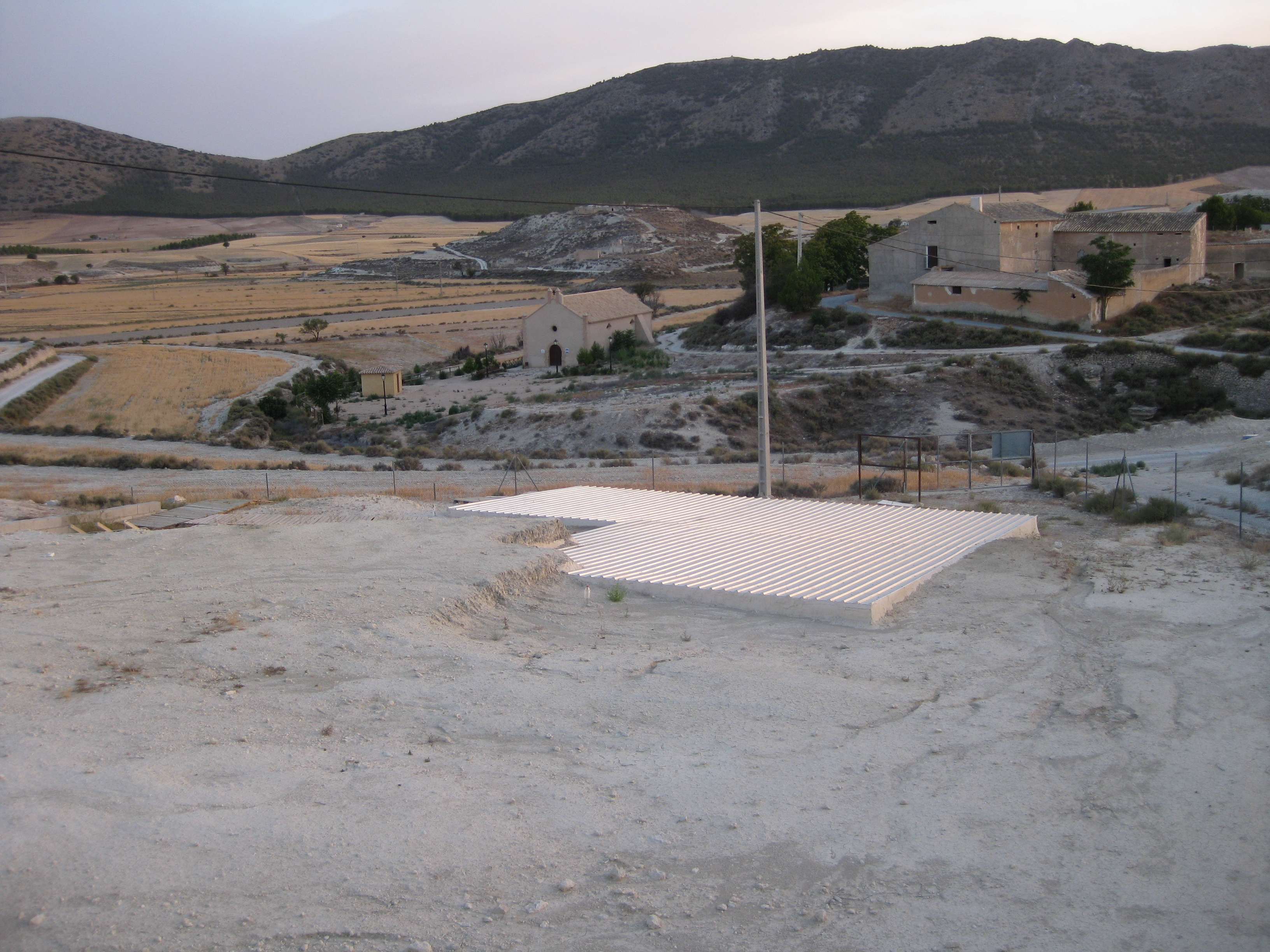 Yacimiento arqueológico y paleontológico de Fuente Nueva III, o Fuente Nueva 3, en la región de Orce